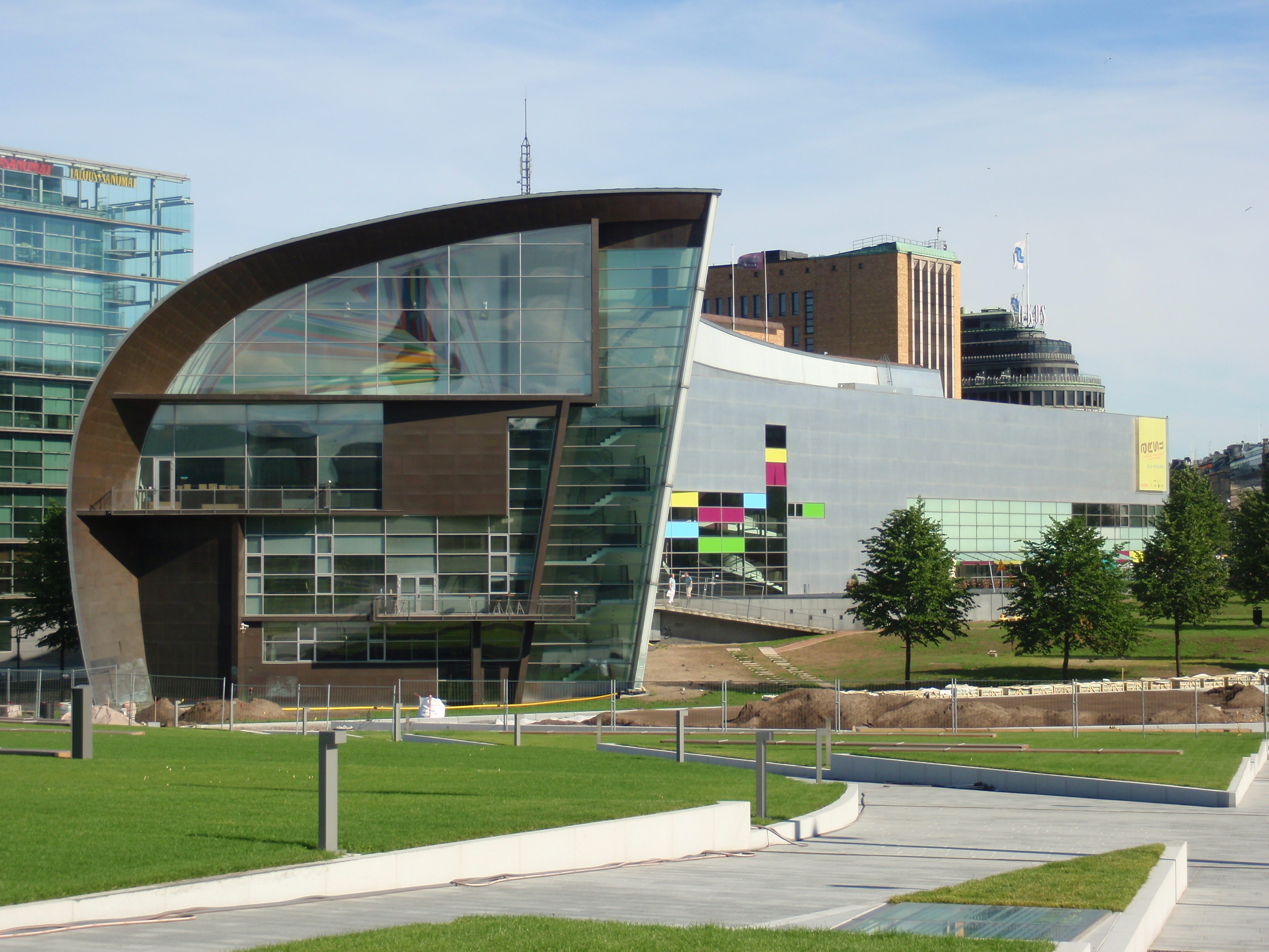 Kiasma